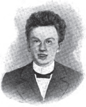 В.И. Степанов (1866 - 1896) - русский артист балета